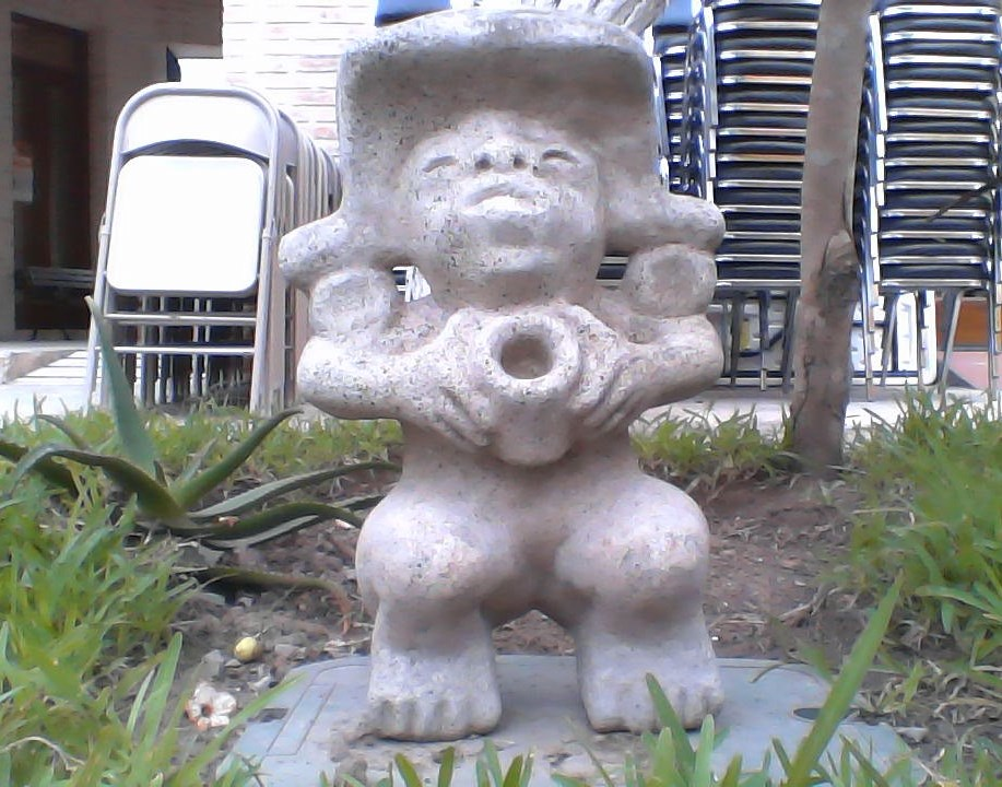 drhrtjhtyjtyjyj